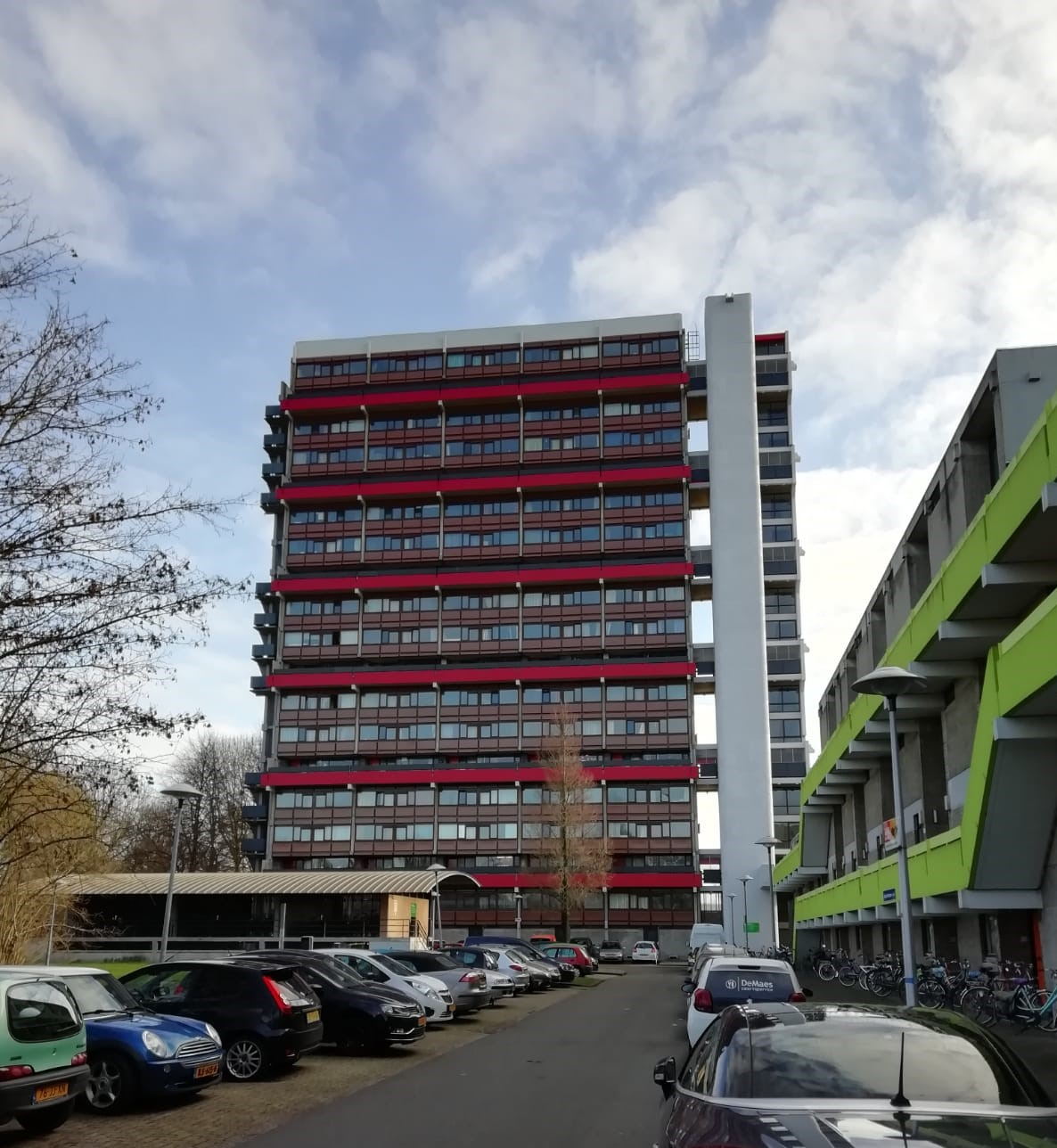 Rode flat TWC Utrecht